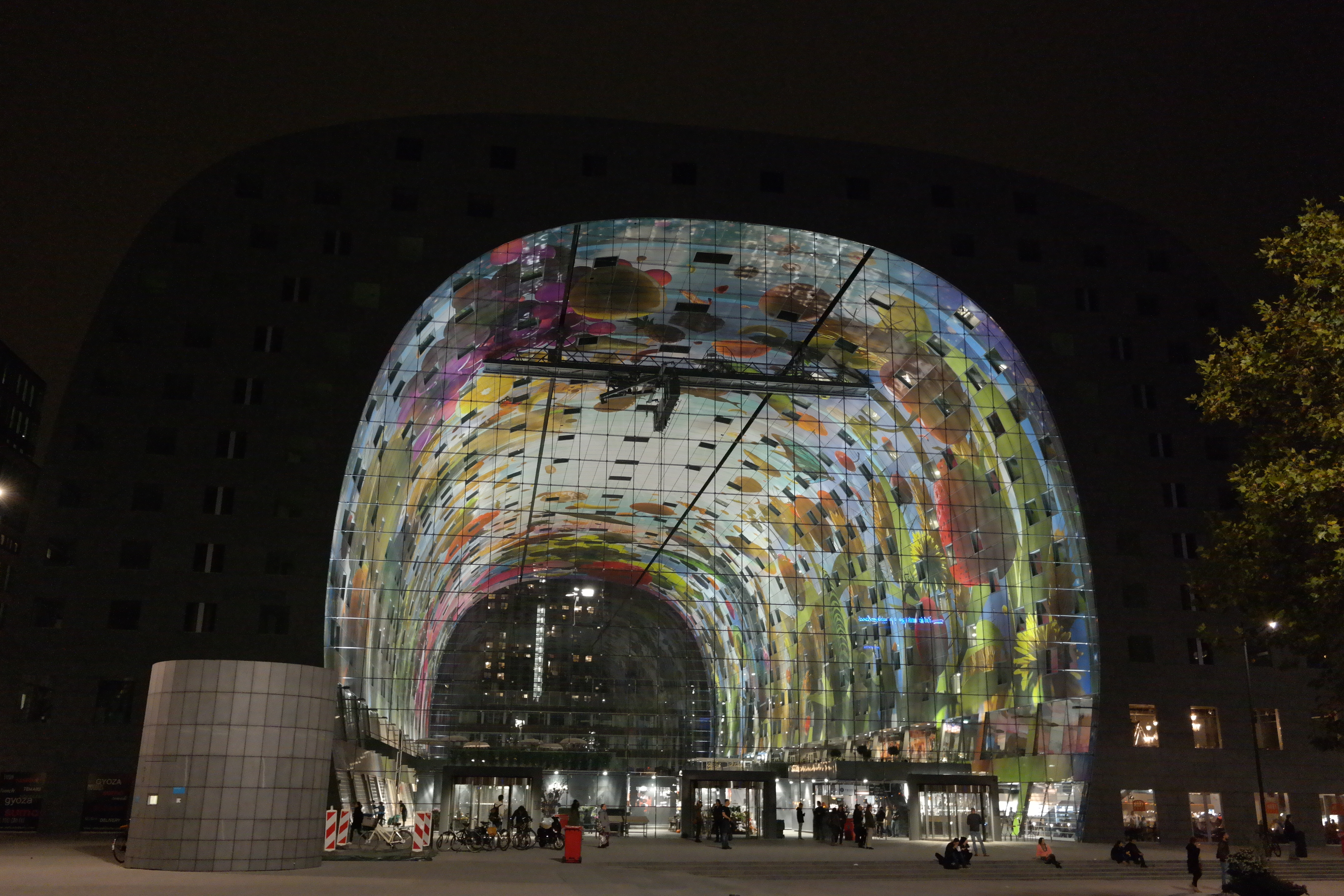 De Rotterdamse Markthal 's avonds.